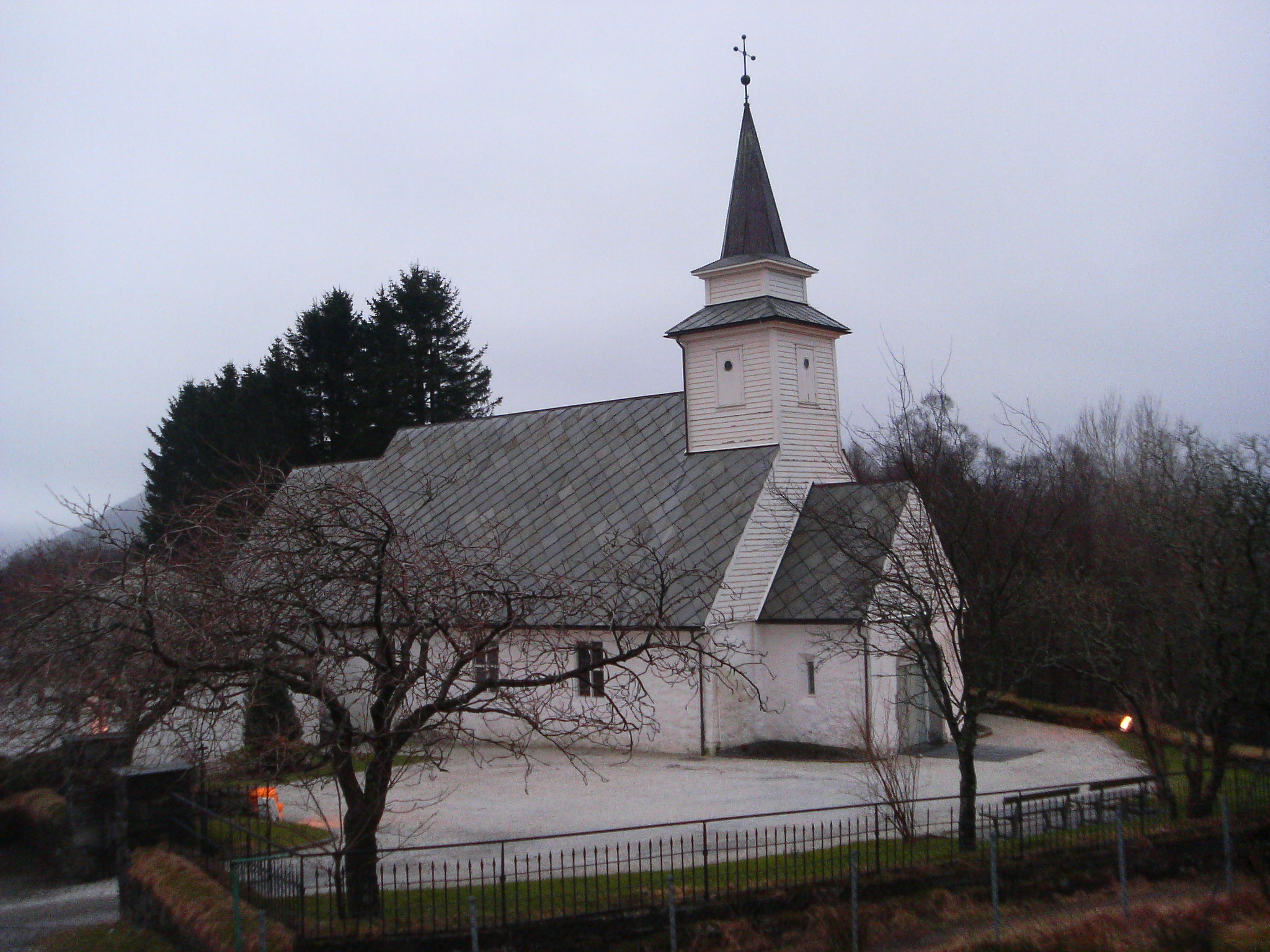 Åsane gamle kirke